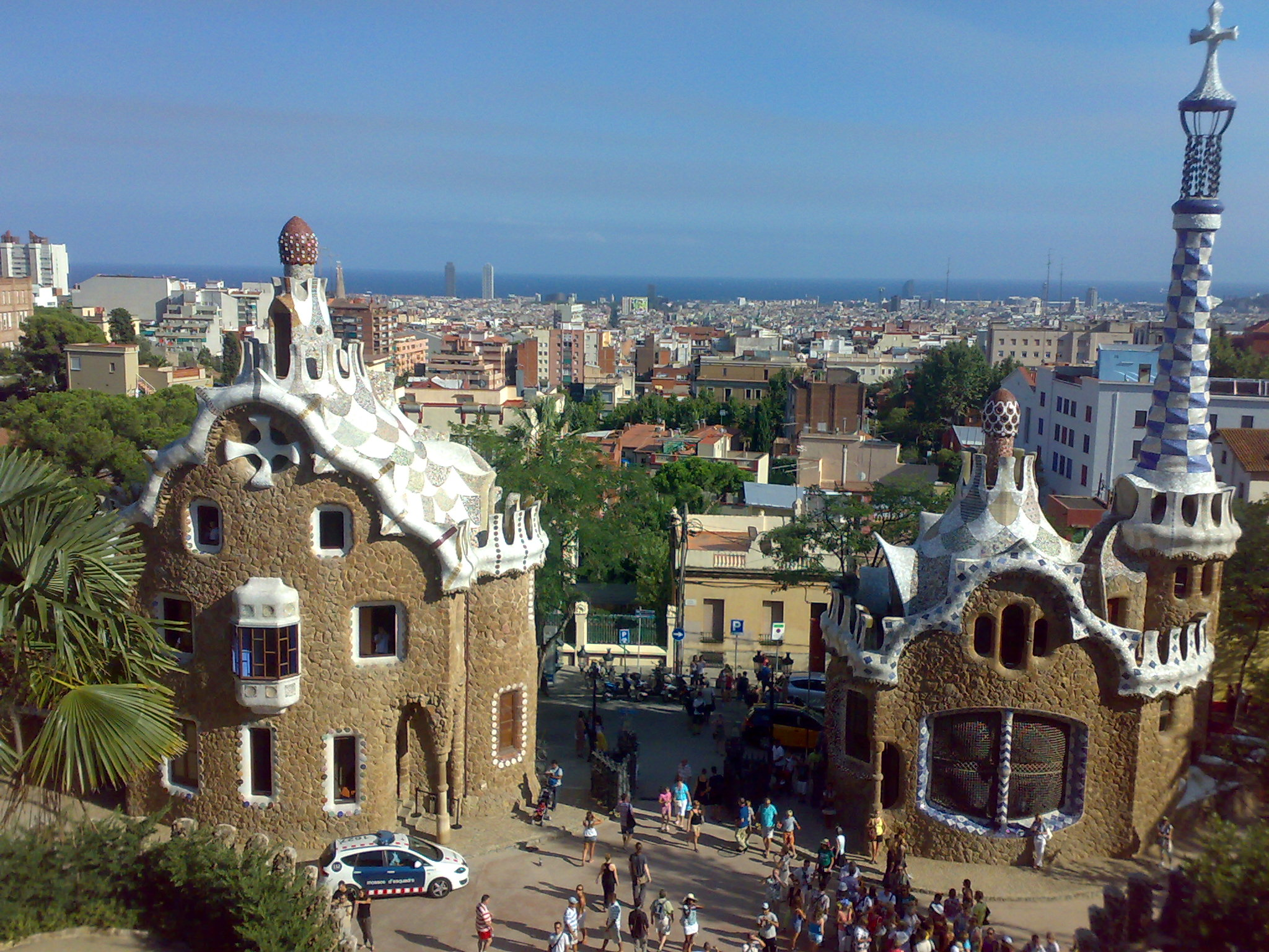 parc guell